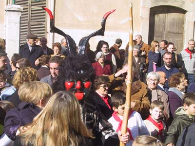 Festa de Sant Antoni d'Artà. Dimoni gran